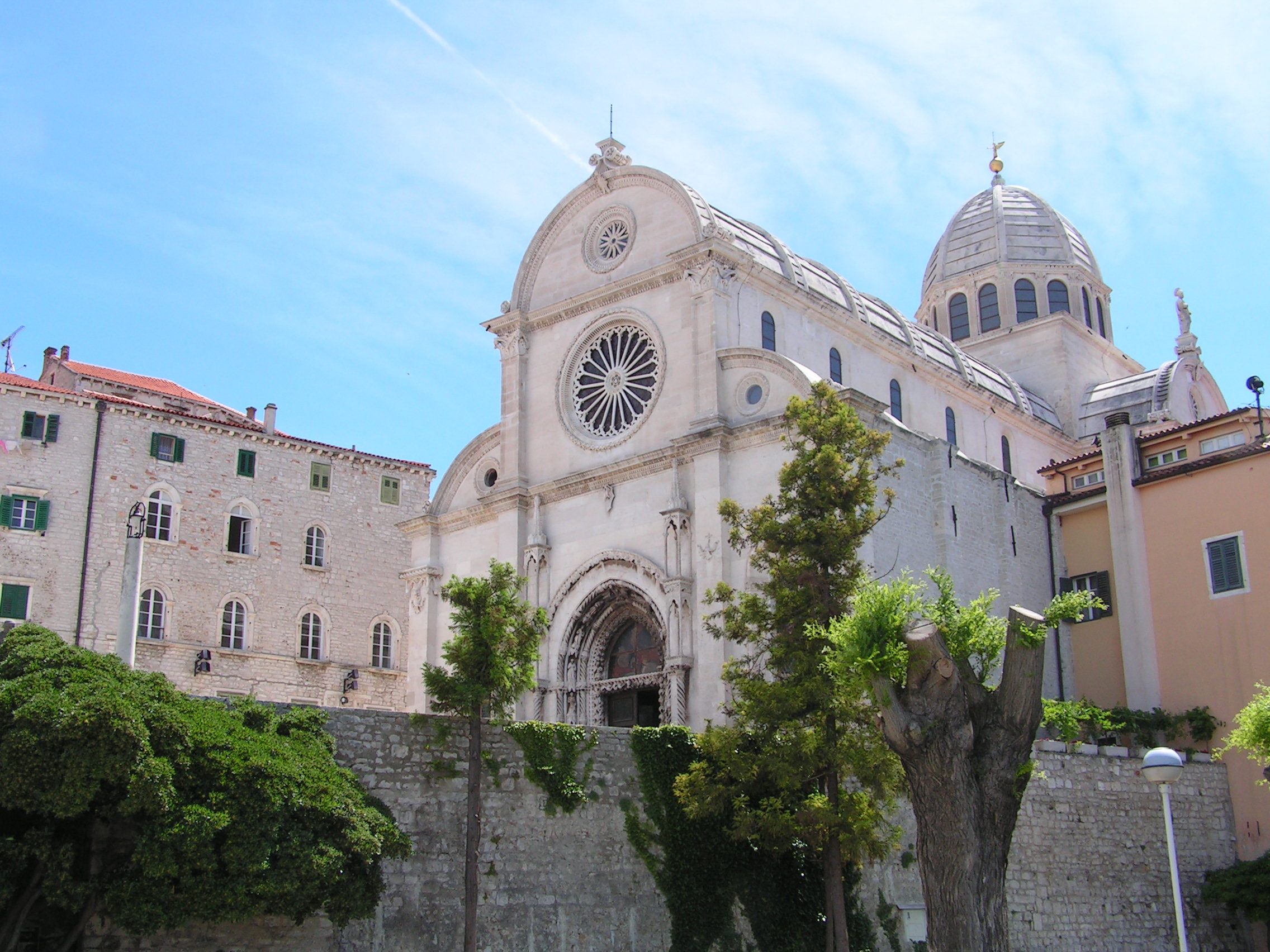 St. Jacobuskathedraal in Sibenik